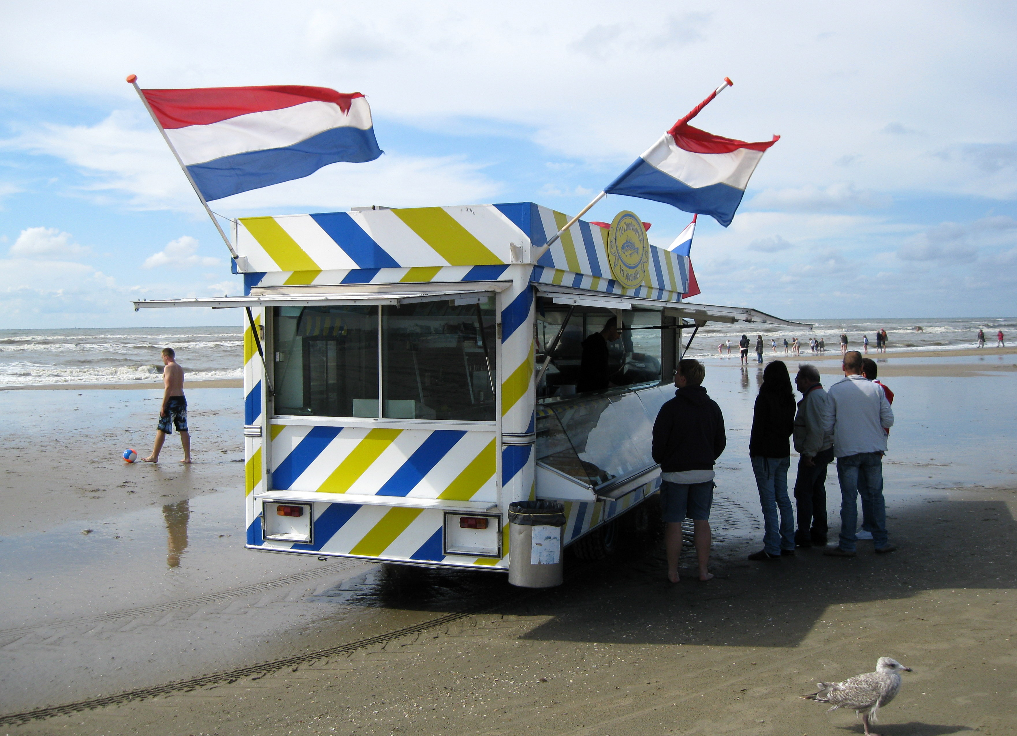 Zicht op het strand van Zandvoort